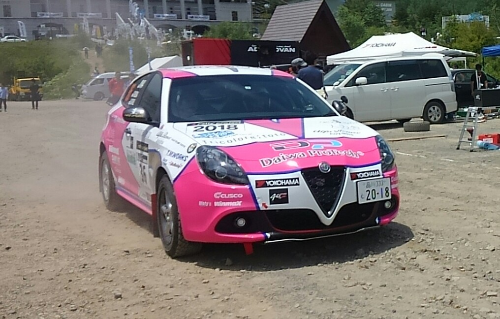 全日本ラリー、竹岡圭/佐竹尚子組のアルファロメオ・ジュリエッタ